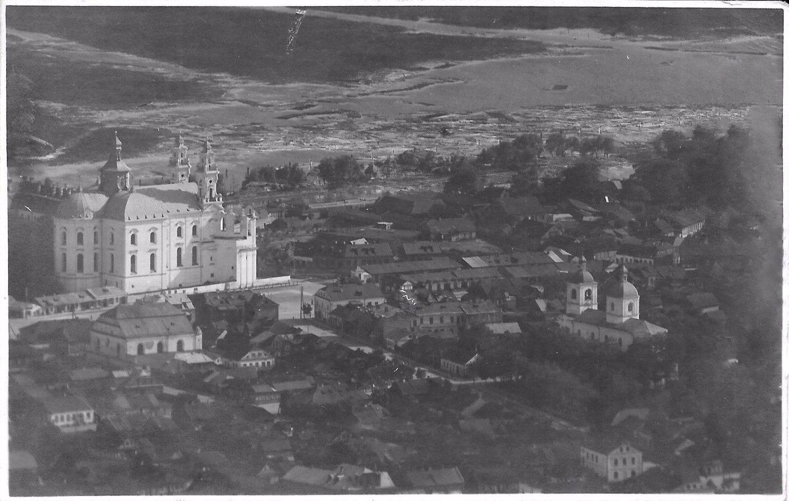 Беларуская (тарашкевіца): Пінск (Pinsk), рог вуліцы Лагішынскай (vulica Łahišynskaja) і пляцу Рынку (plac Rynak). Аэрафотаздымак